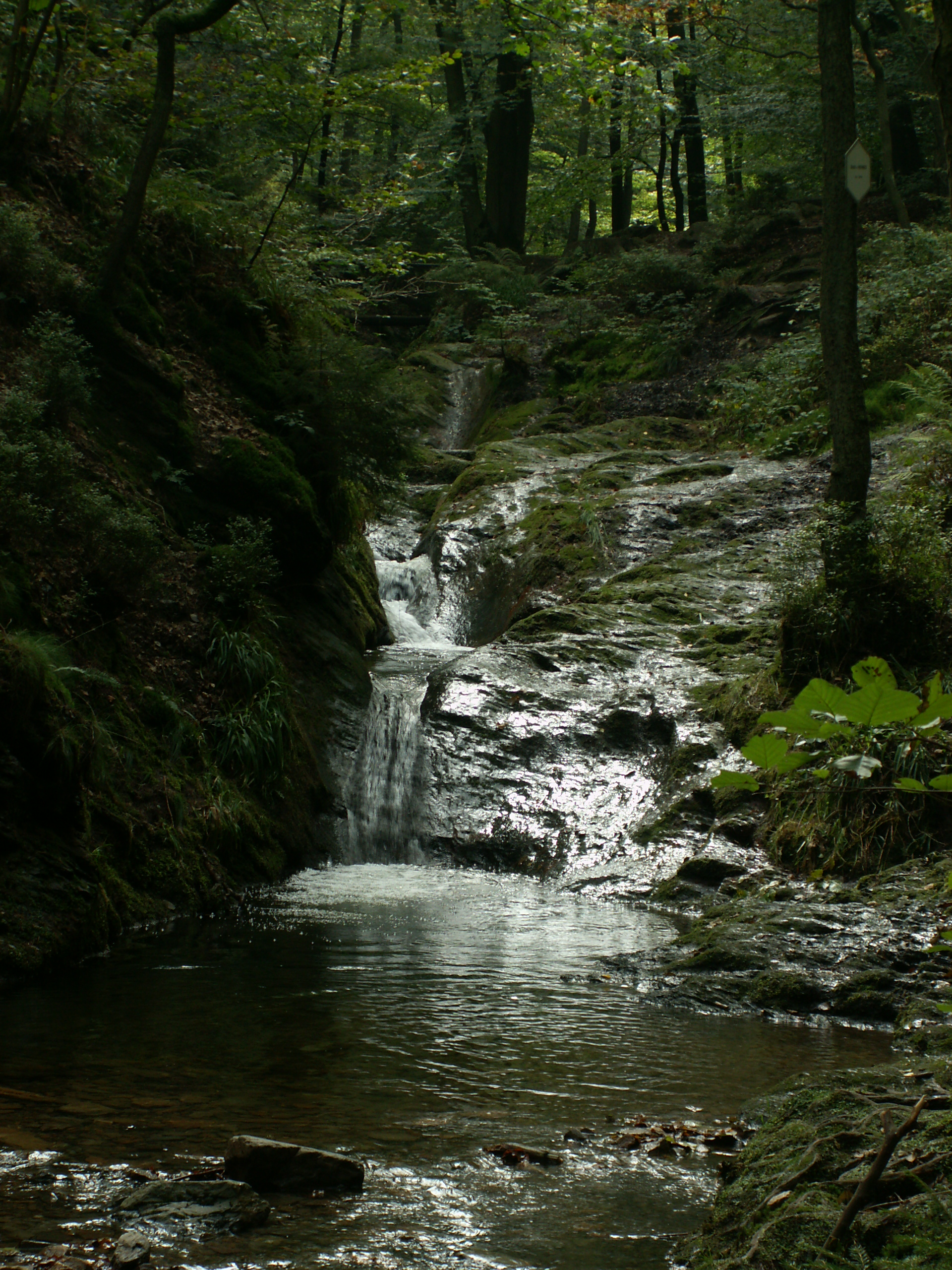 Ninglinspo, Nonceveux, ruisseau de Belgique, cascade, vallée Amblève